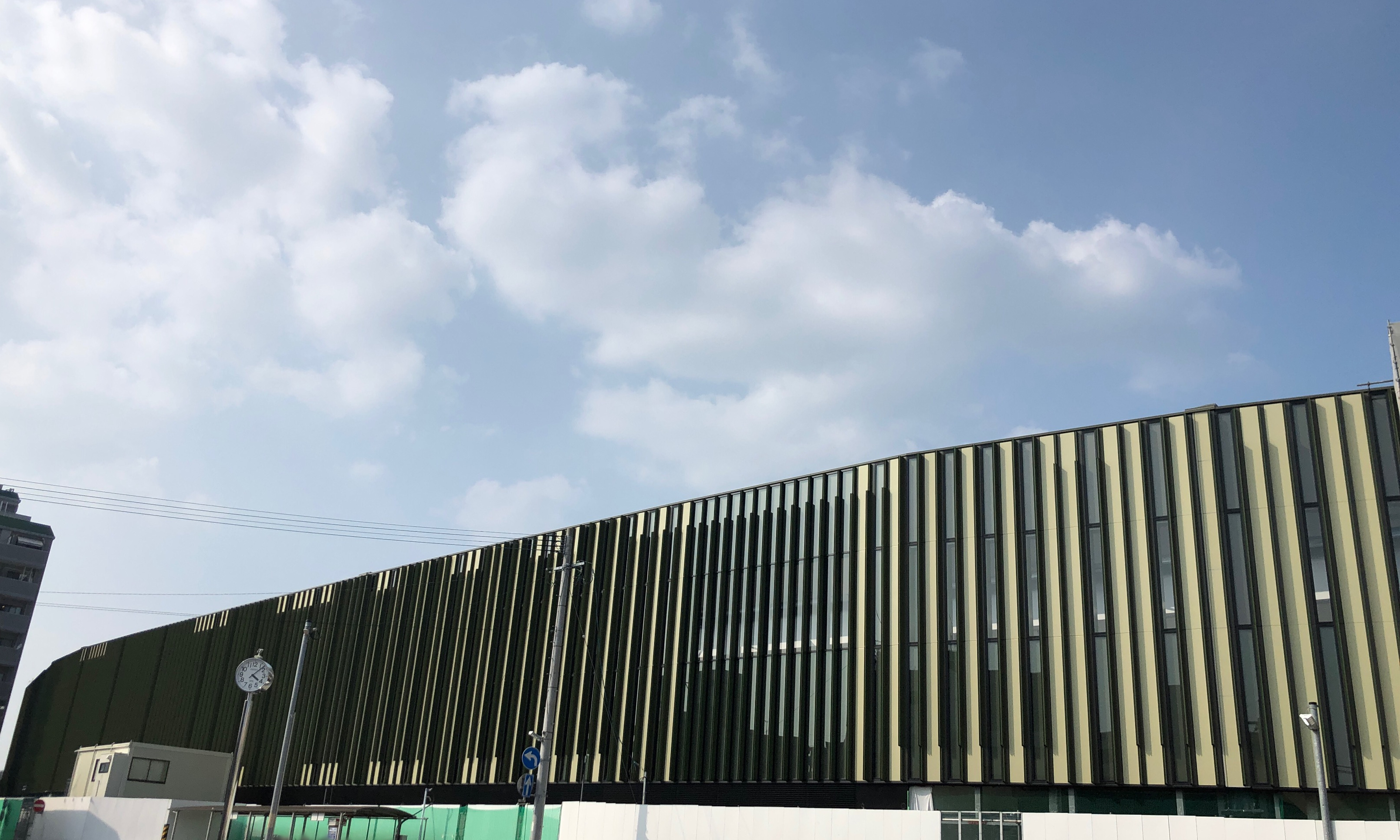 福岡県大野城市